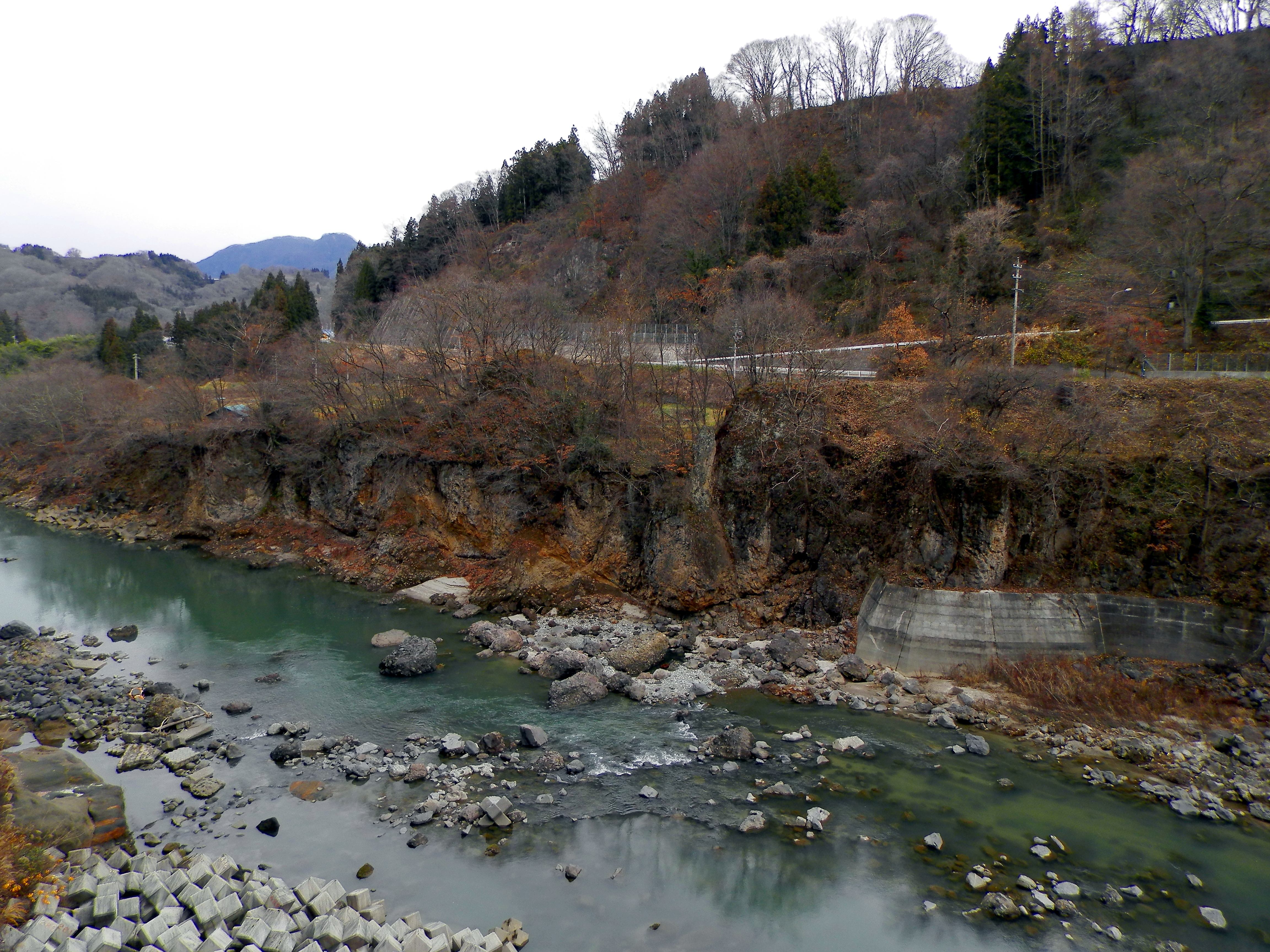 1847年善光寺地震で犀川に河道閉塞を生じた場所。所在地、長野県長野市信州新町水篠橋下流